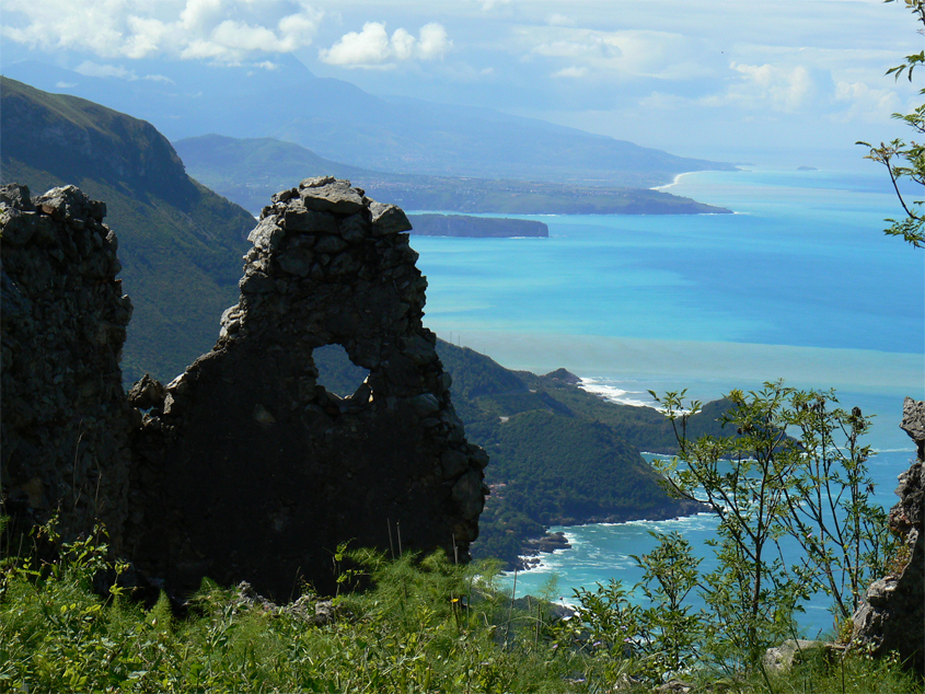 Maratea, Basilicata, Italia